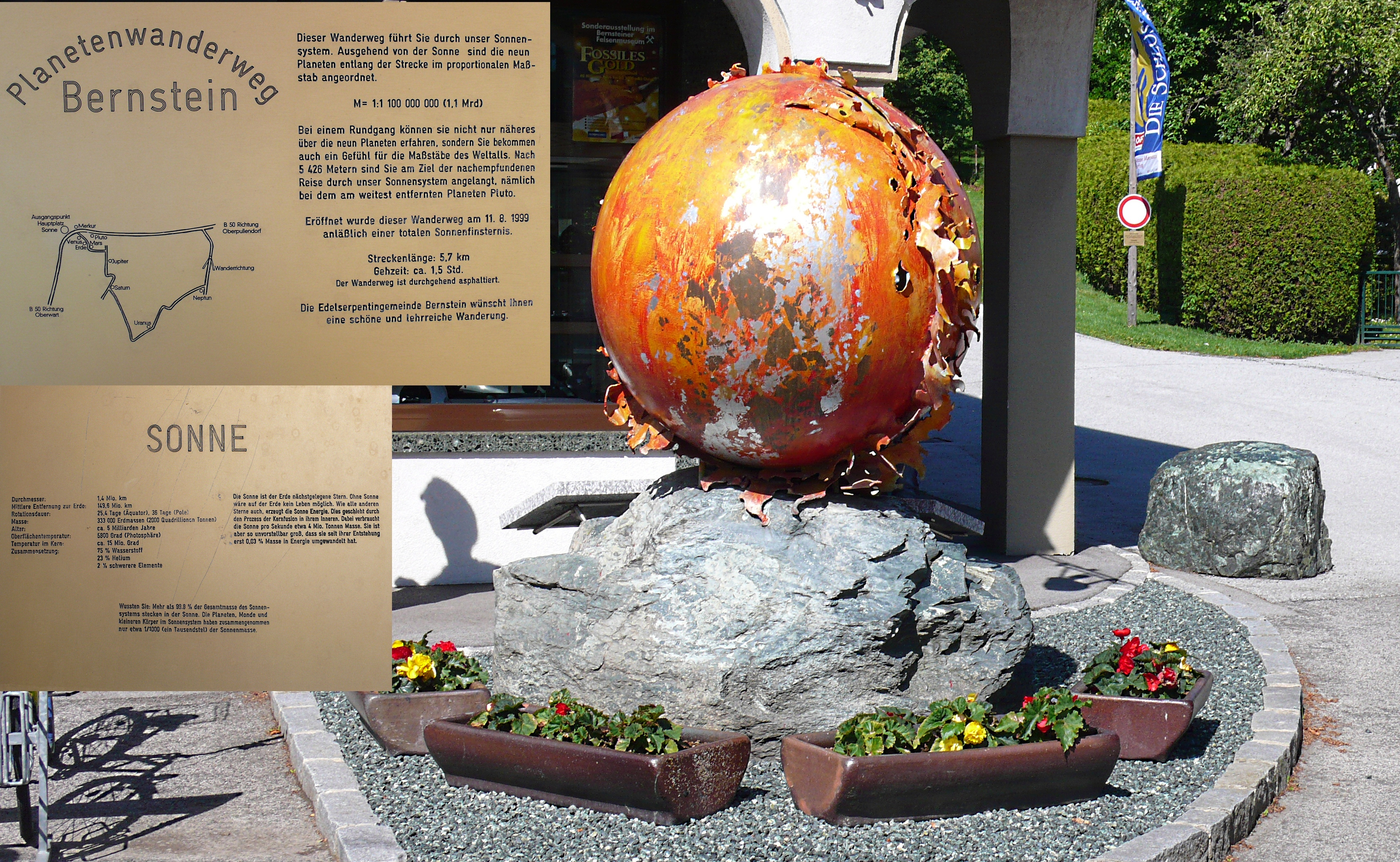 Planetenwanderweg in Bernstein Burgenland Österreich